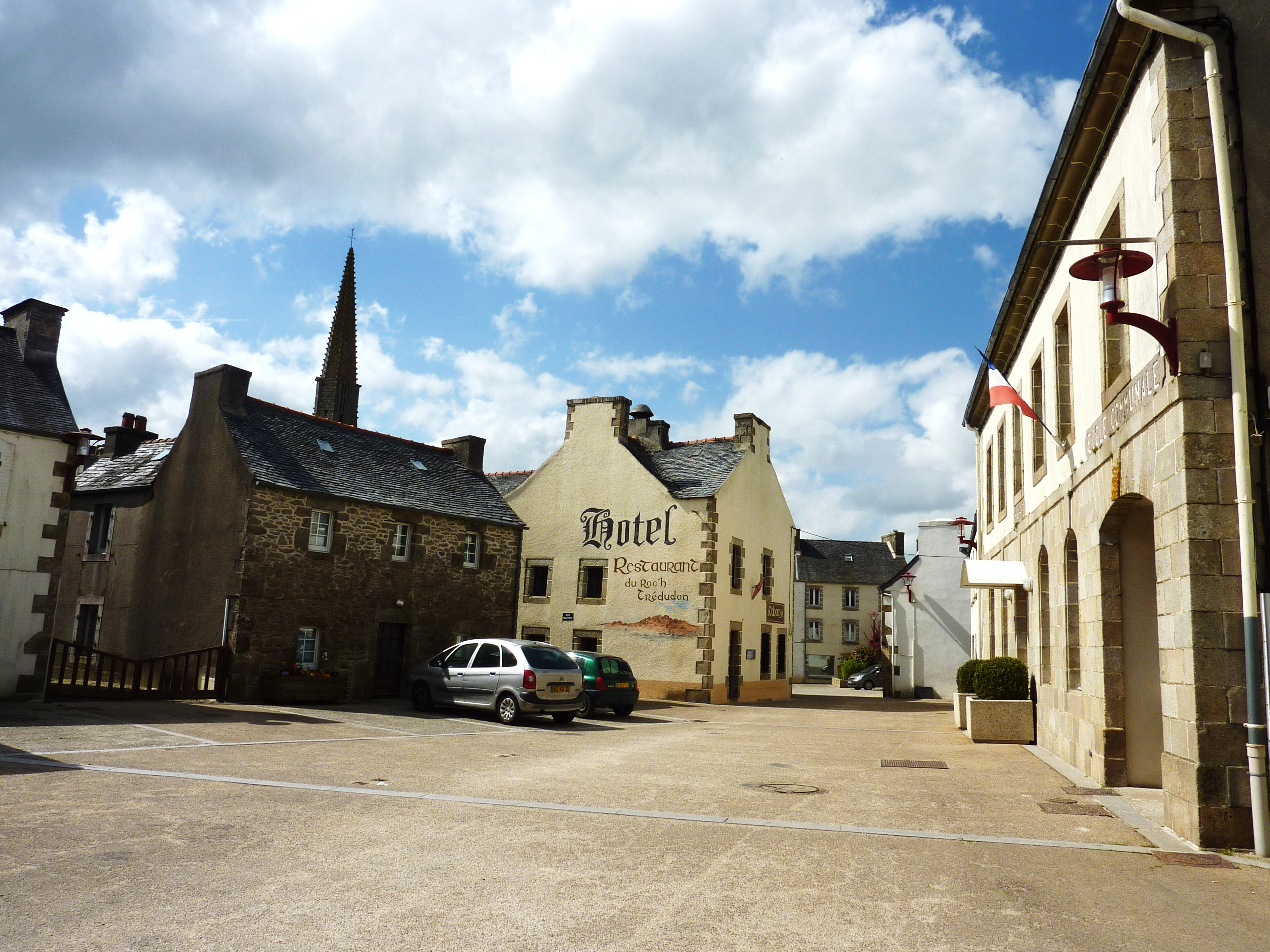 Place de Plounéour-Ménez 1